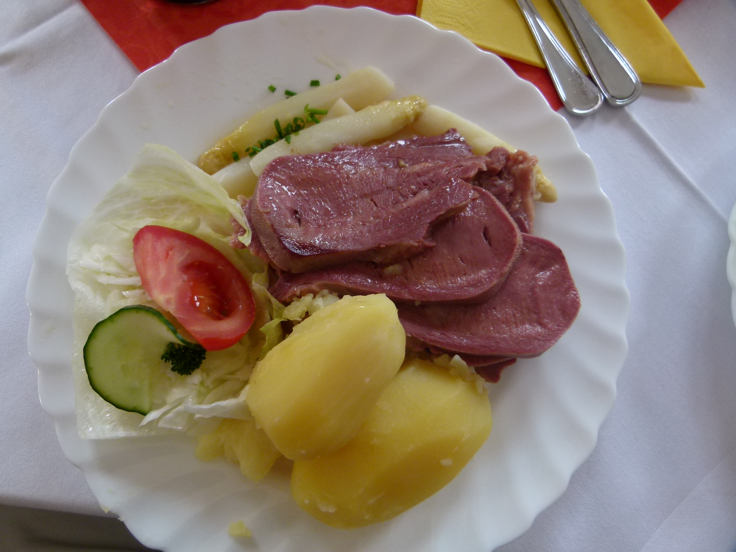 Rinderzunge mit Spargel, Gasthaus Zur alten Säge, Dorf Wehlen, Sächsische Schweiz